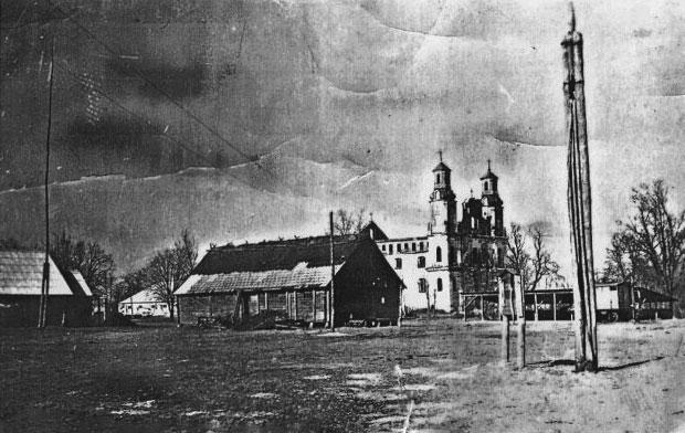 Беларуская (тарашкевіца): Таракань. Манастыр базылянскі Яўленьня Гасподняга